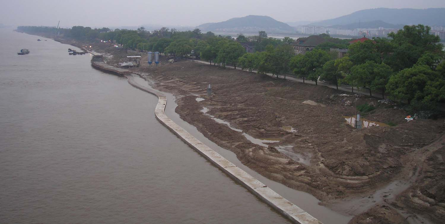 长沙橘子洲，2006年4月15日/Cncs拍摄